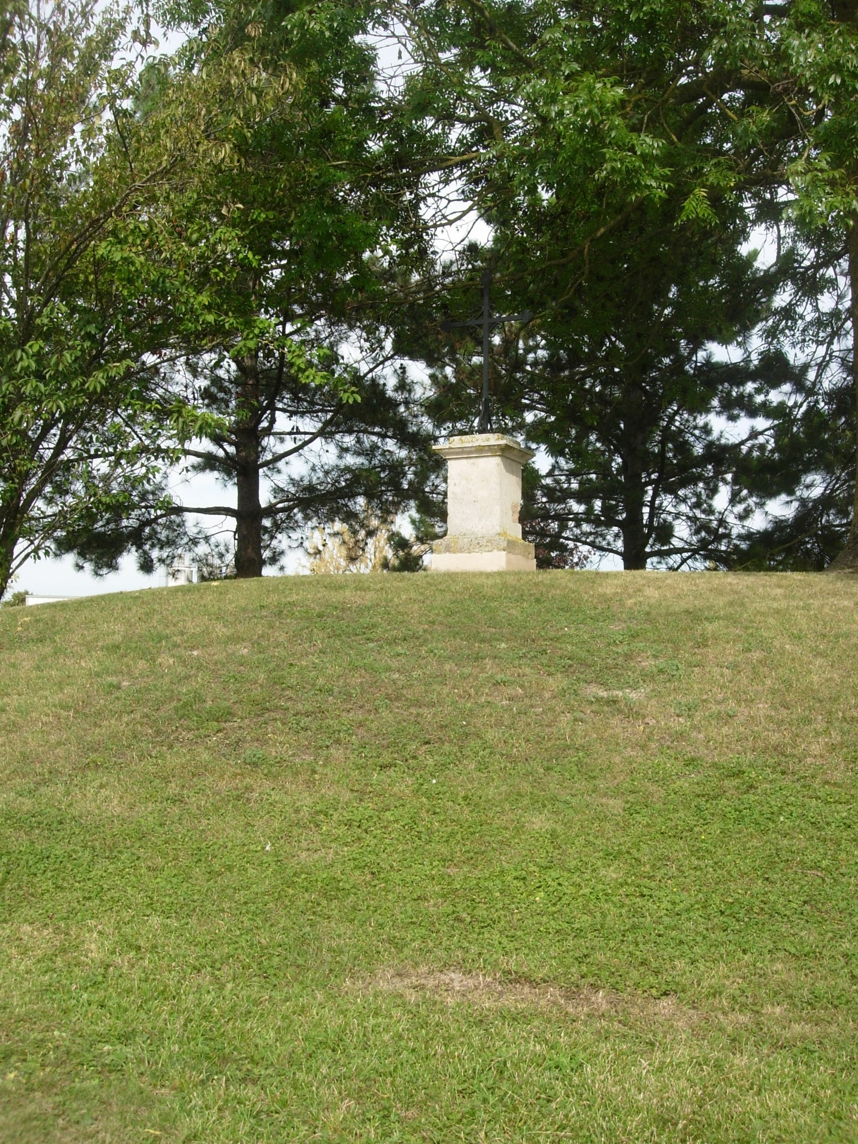 La Croix La Beigne construite sur un tumulus à Sainte-Savine - Classé monument historique